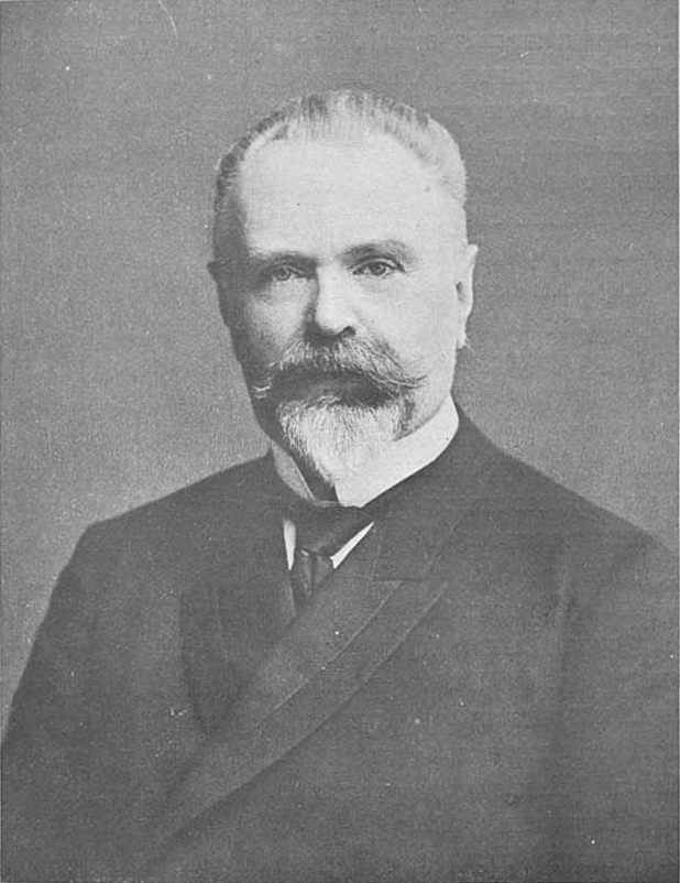 Борис Владимирович Штюрмер, член Государственного совета Российской империи.